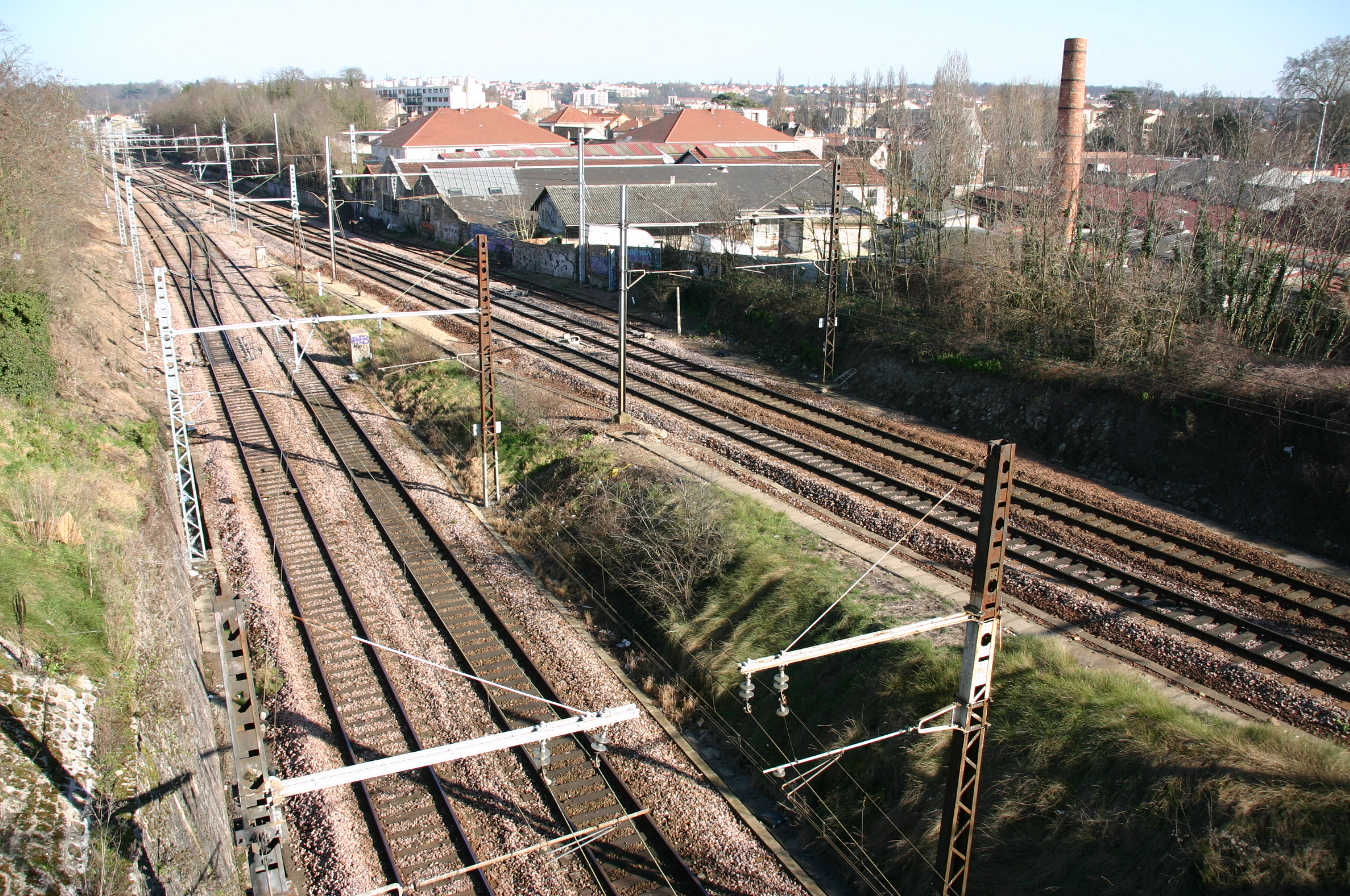 Les lignes de Corbeil à Montereau (à gauche) et de Corbeil à Malesherbes (à droite) au sud de la gare de Corbeil-Essonnes, Corbeil-Essonnes, département de l'Essonne (France)